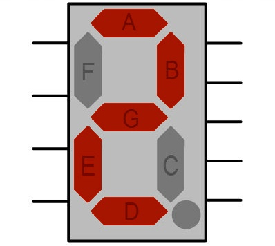 Klasická sedmisegmentovka s tečkou